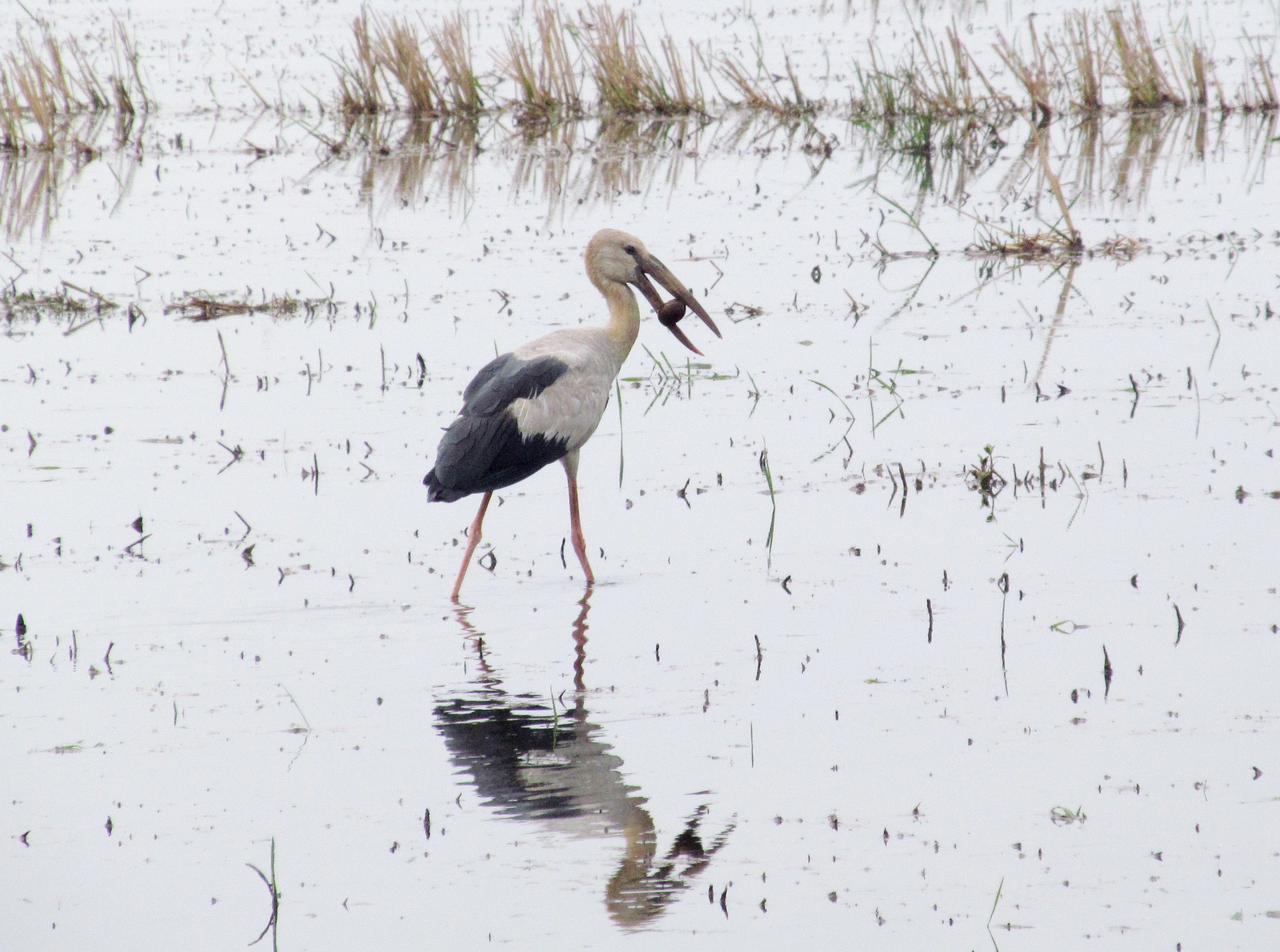 ചേരാക്കൊക്കന്‍, ഞവുഞ്ഞിപ്പൊട്ടന്‍.ചിത്രം അടാട്ടുനിന്നും